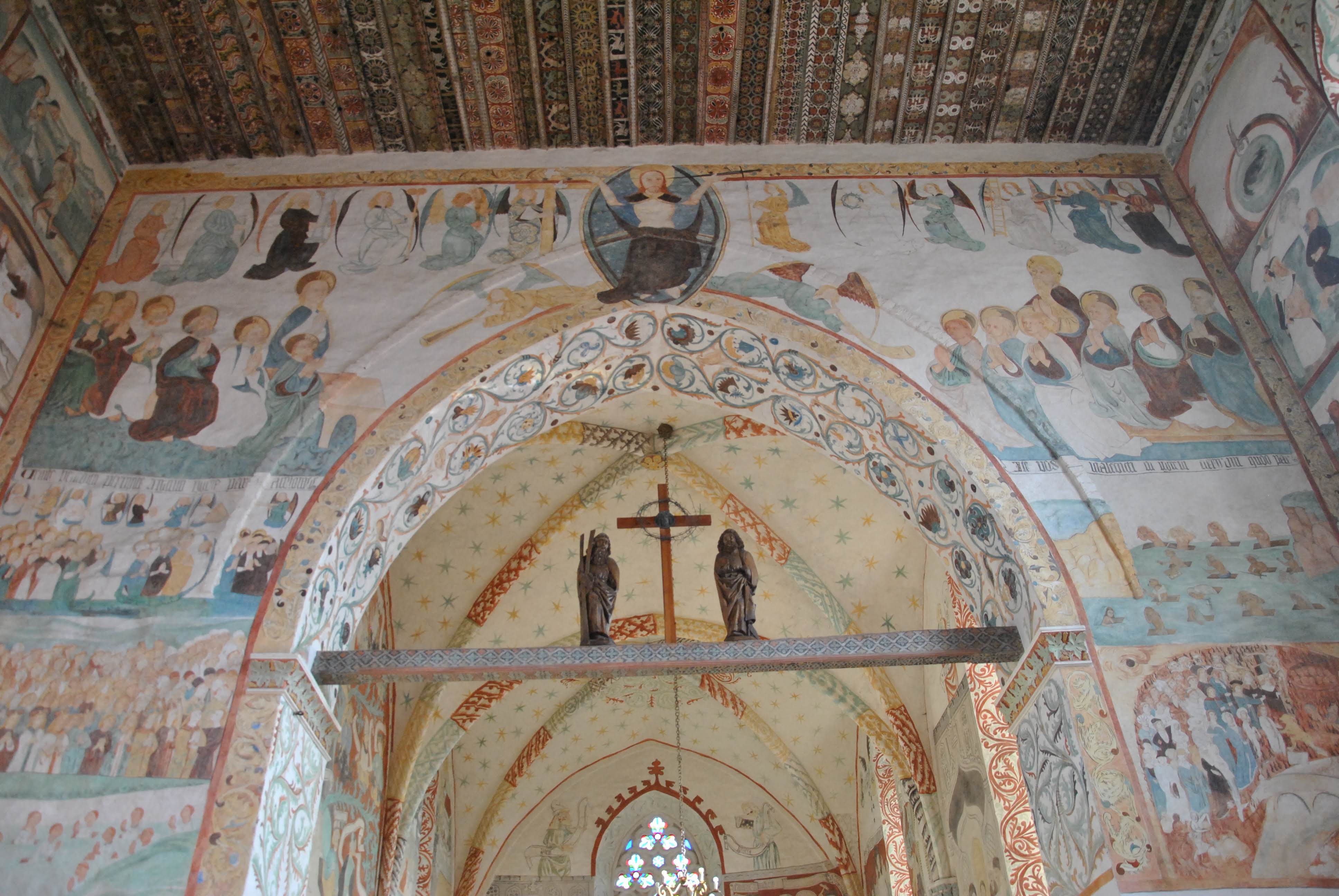 Wnętrze kościoła w Małujowicach.Belka tęczowa ze sceną ukrzyżowania oraz malowidła naścienne.